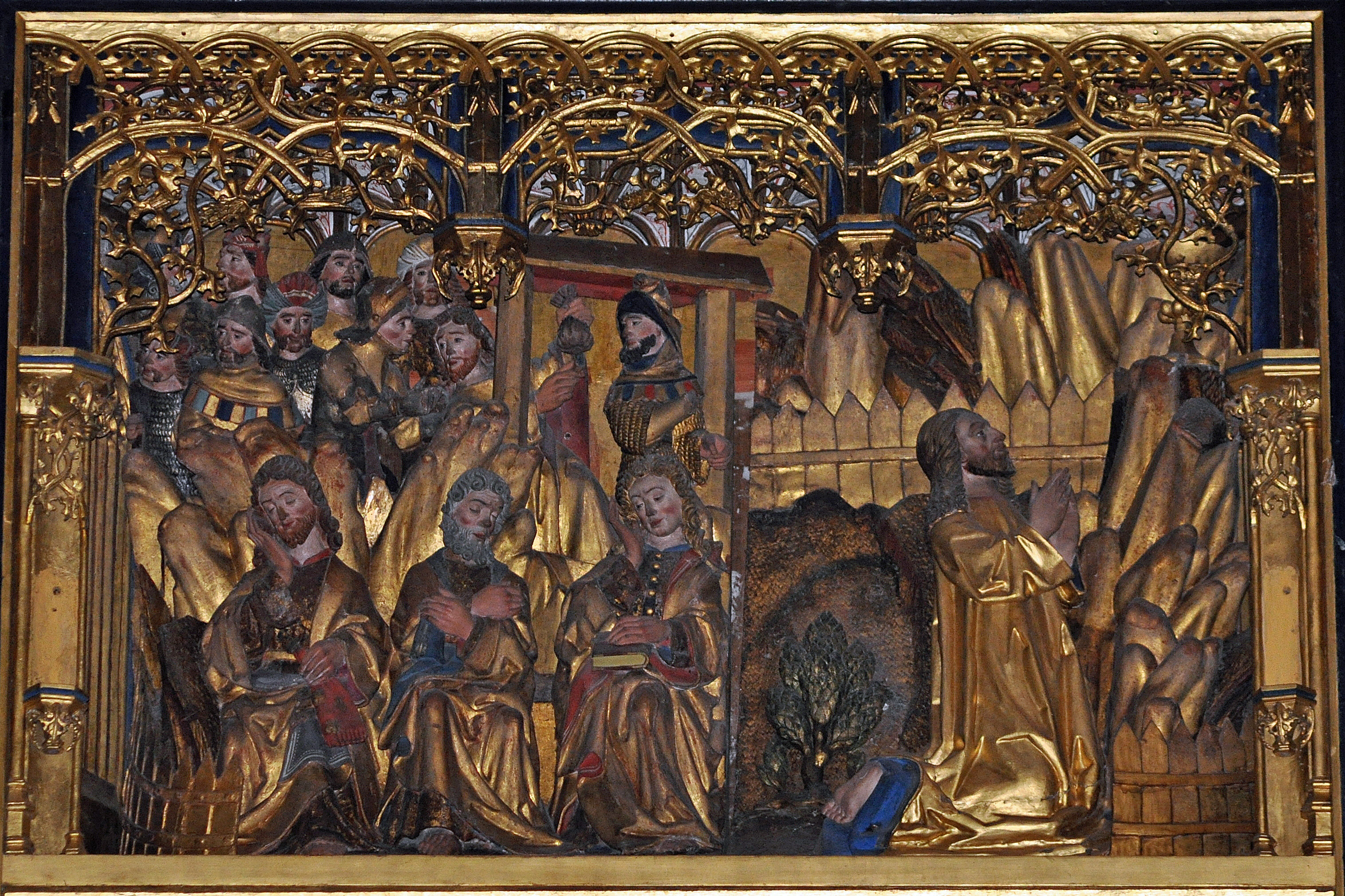 Stralsund, Nikolaikirche, Hochaltar, Schnitzkasten links oben (2012-12-29) 1, by Klugschnacker in Wikipedia